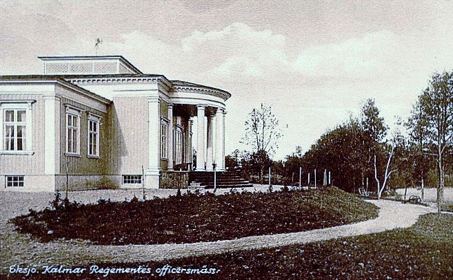 Officersmässen Trianon. Ursprungligen uppförd 1792 i Mariannelund. Flyttad 1796 till Hultsfred och 1921 till Eksjö. Officersmässen förvaltades ursprungligen av Kalmar regementes officerskår, från 1928 av officerskåren vid Norra Smålands regemente, och från 2000 av officerskåren vid Göta ingenjörregemente.